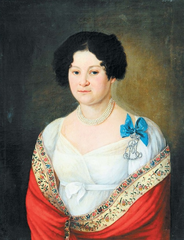 Мария Алексеевна Орлова - Денисова (1784—1829)